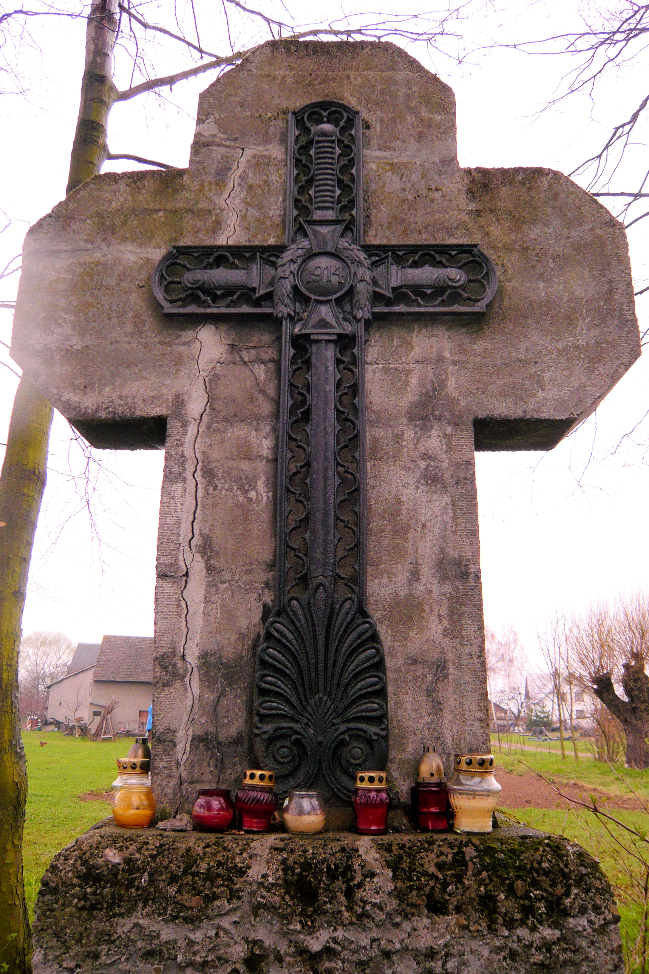 Cmentarz wojenny 317 Bogucice IX okręg Bochnia